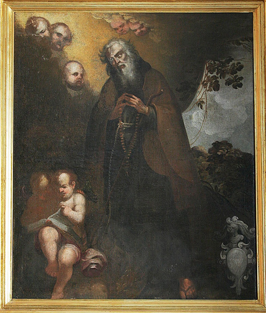 Corrado Confalonieri, Ölgemälde, Sizilien, 18. Jahrhundert